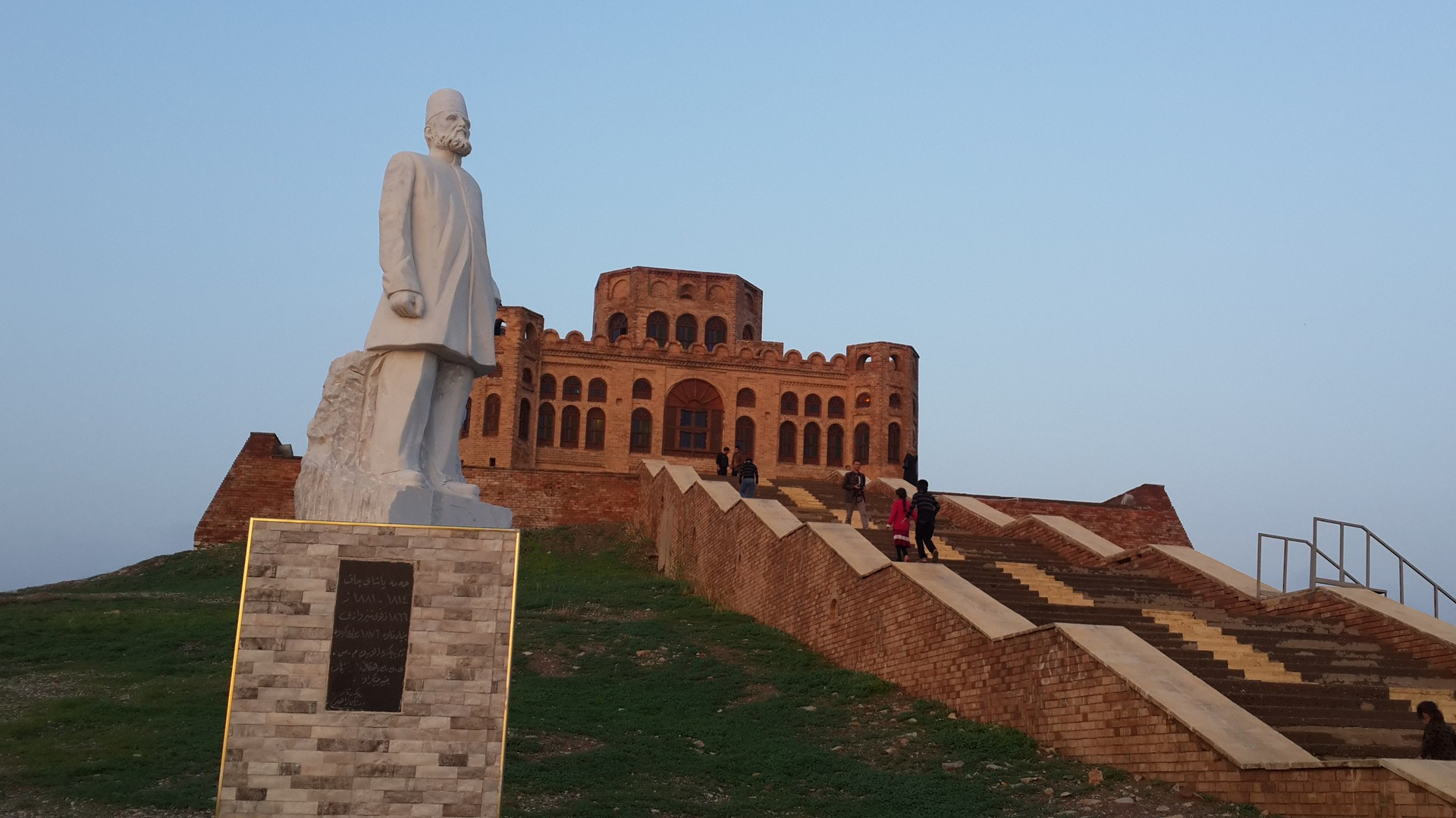 Kurdî: قەڵای شێروانە و پەیکەری حەمە پاشای جاف